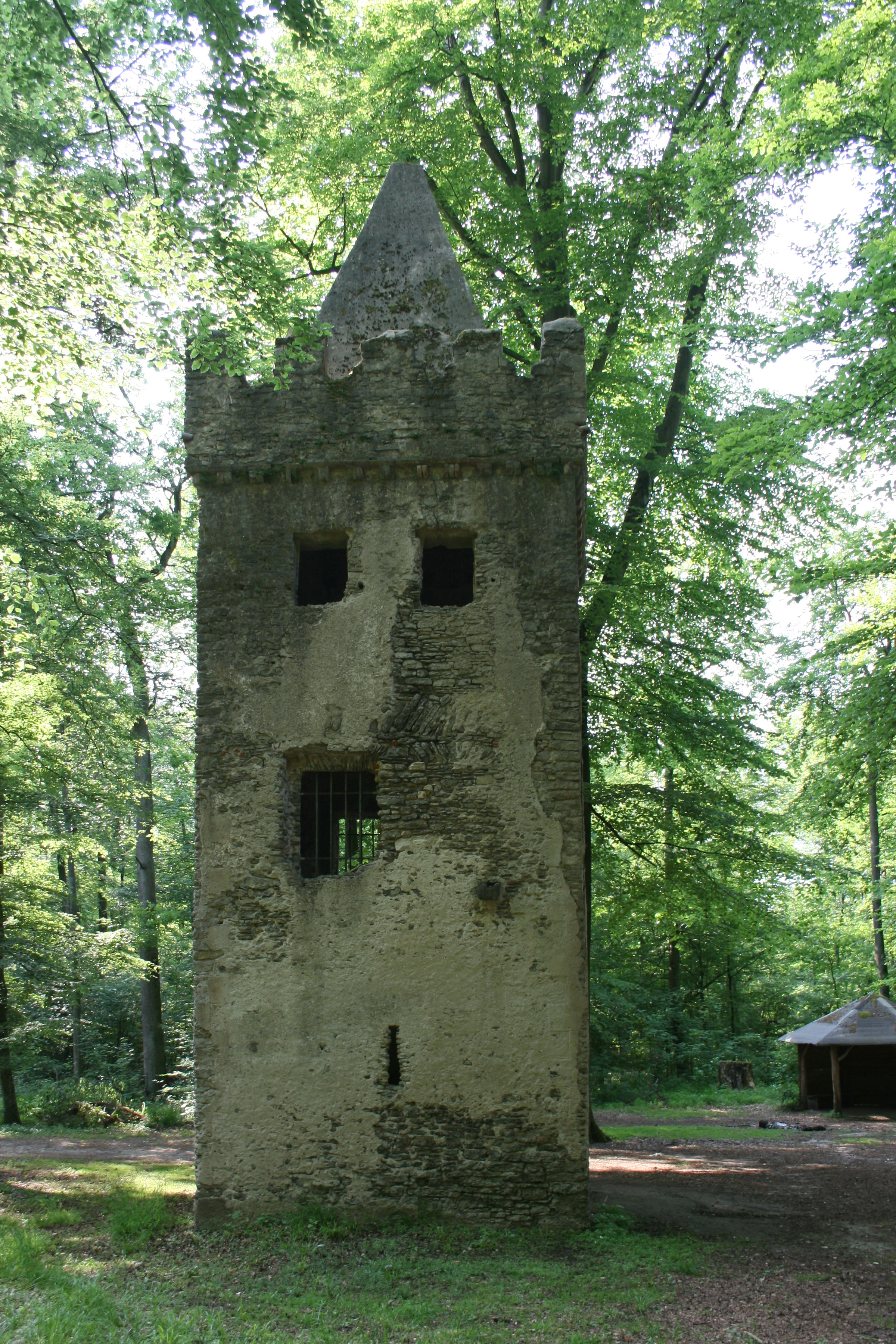 Klosterruine St. Wolfgang bei Hanau, Ansicht des Turms nach Entfernung von Bewuchs, Mai 2012.